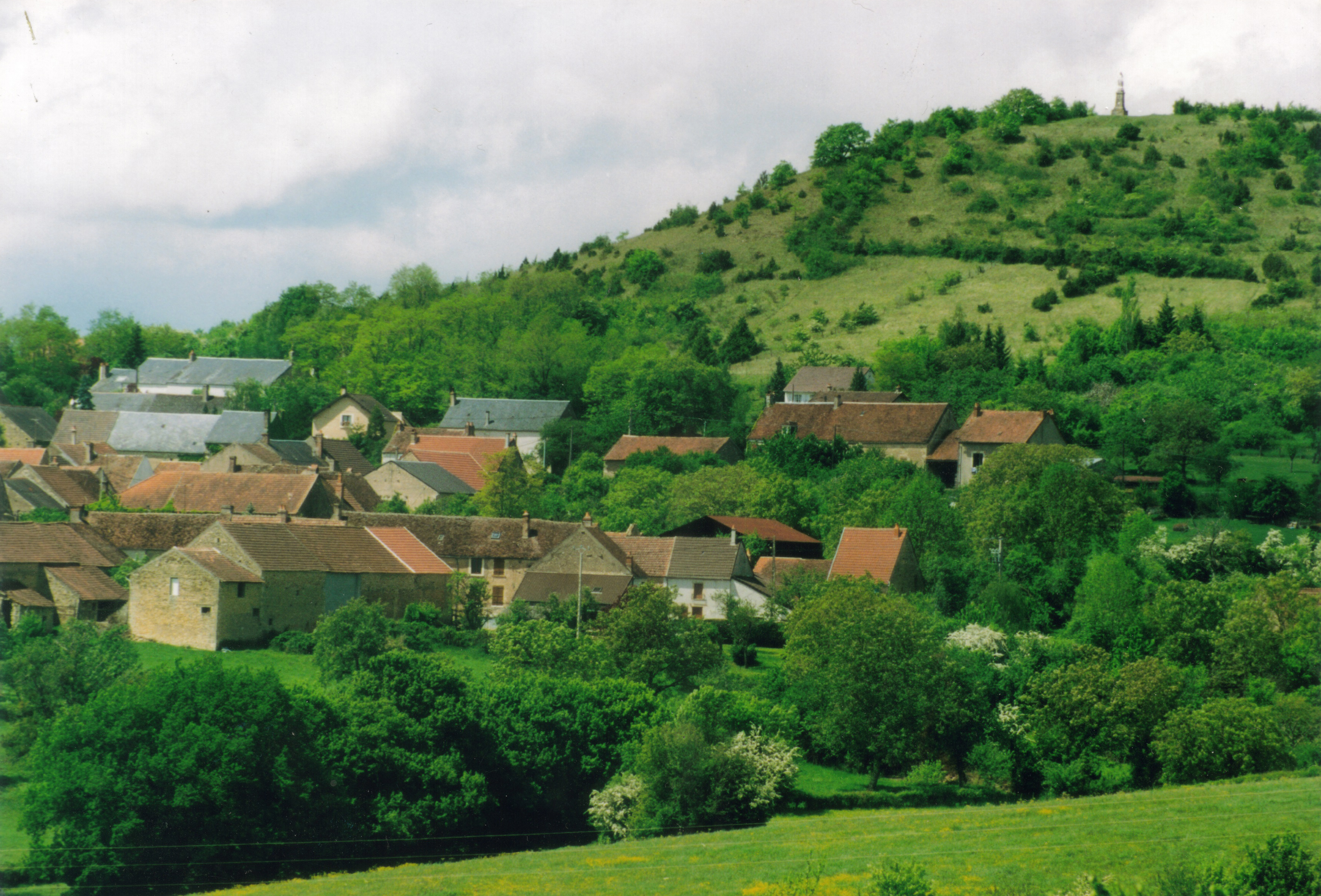 Le Montgué dominant Asnan, 2002.